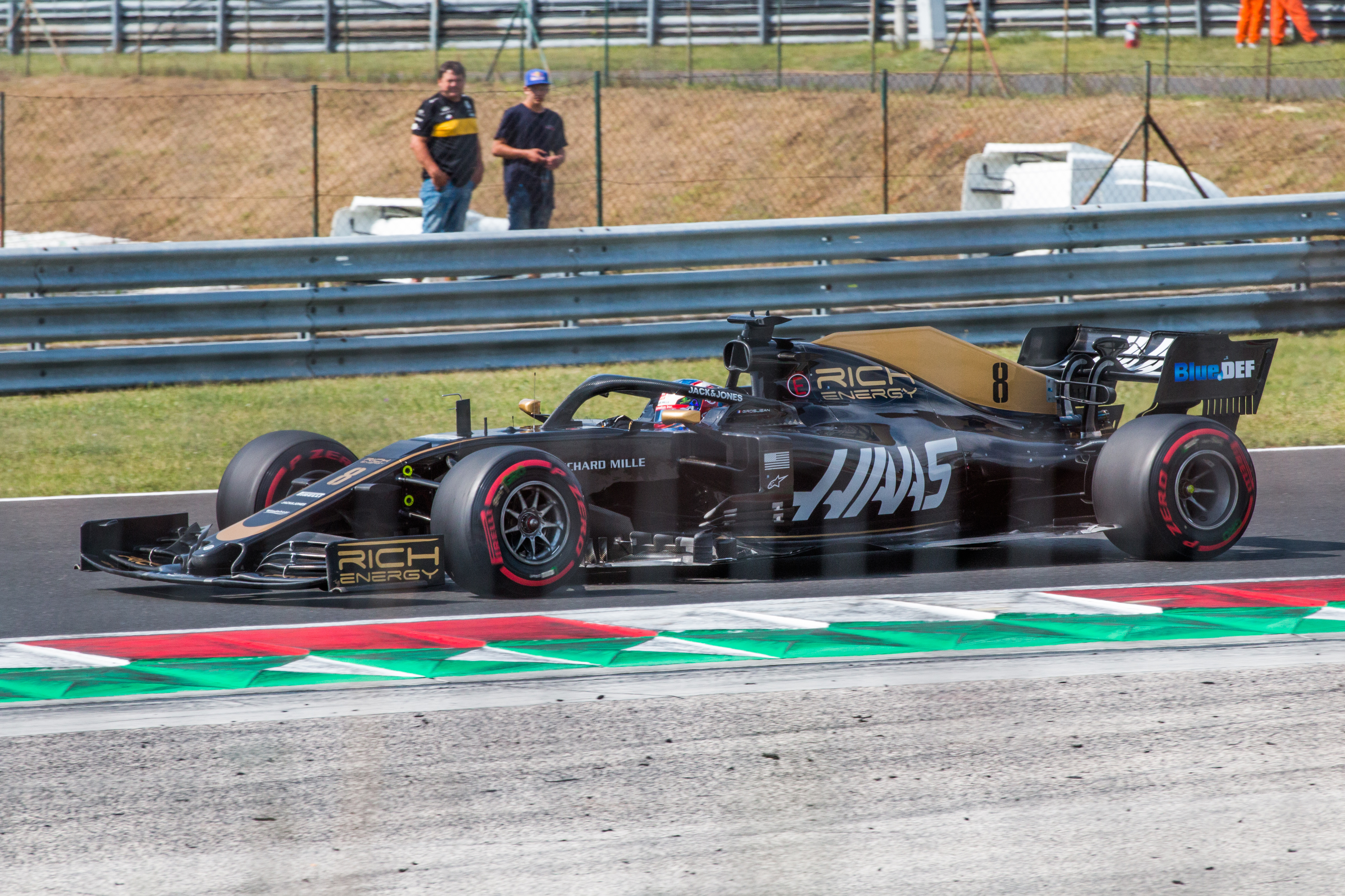 Romain Grosjean in his Haas VF-19 during Formula 1 Hungarian Grand Prix 2019 on the Hungaroring